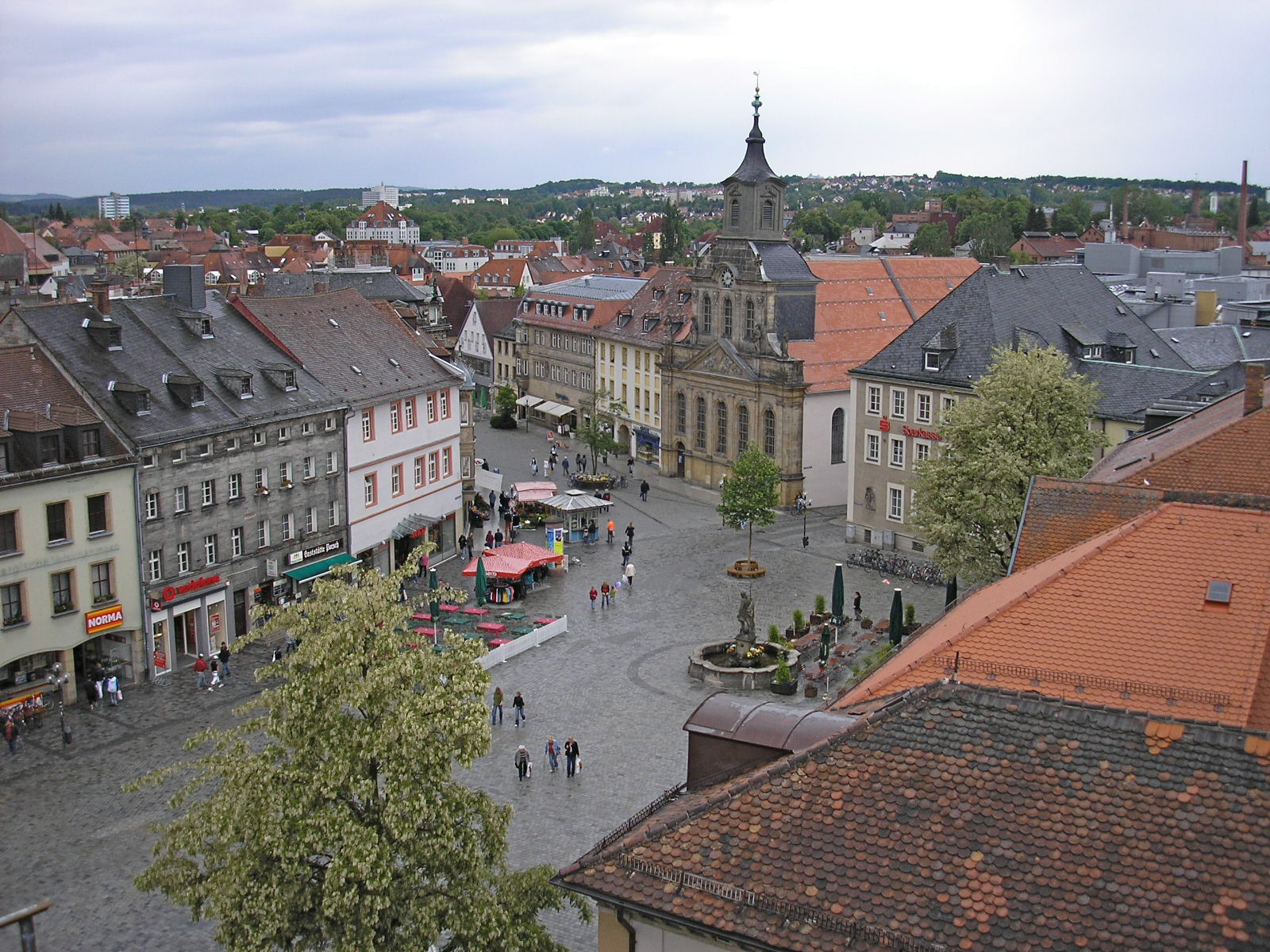 Blick über den Marktplatz der Stadt Bayreuth (fotografiert von der Karstadt-Dachterrasse), Maximilianstraße